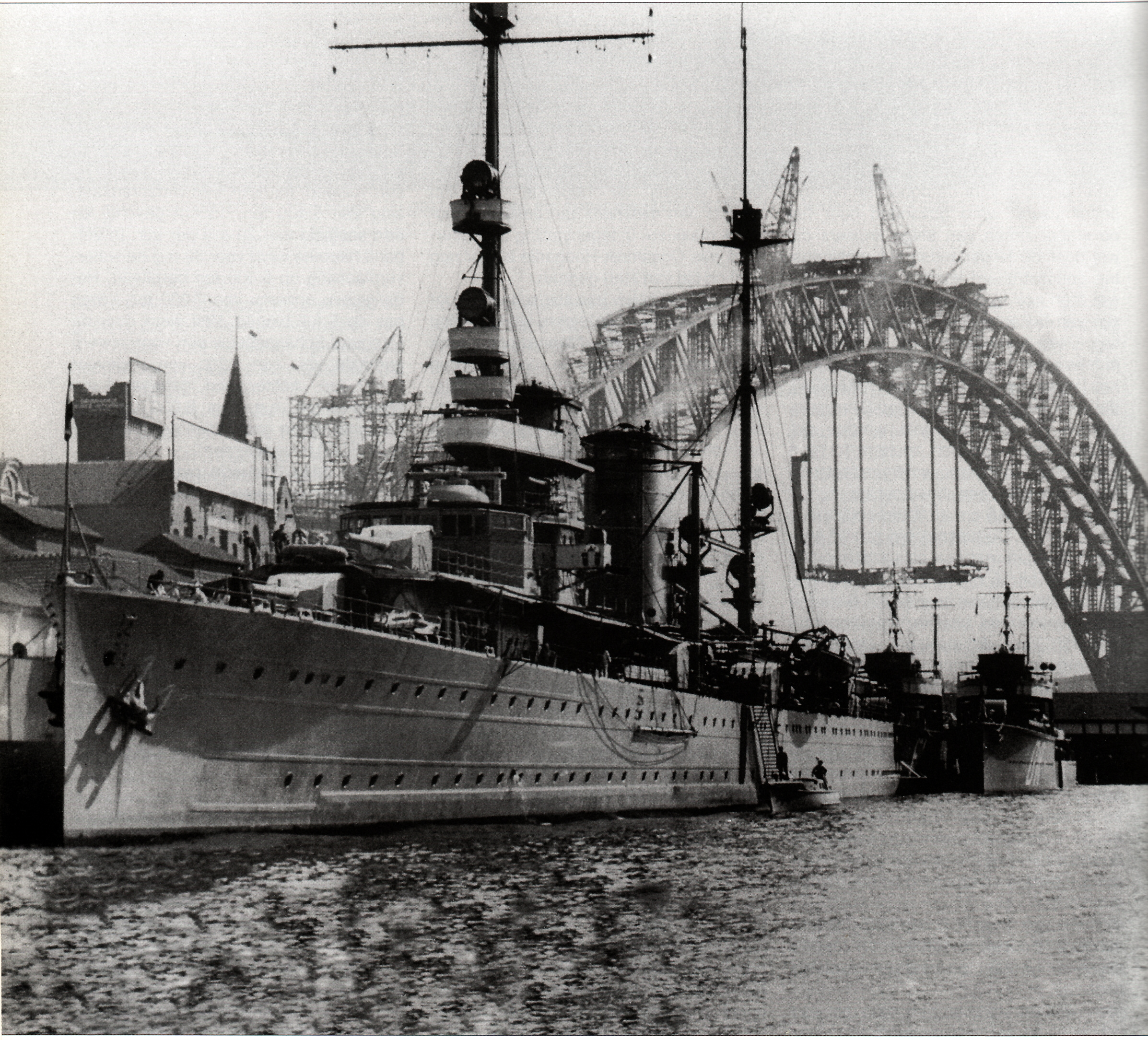 Hr. Ms. Java afgemeerd in Sydney in 1930, met daar achter de De Ruyter en Evertsen. Met op de achtergrond Sydney Harbour Bridge.